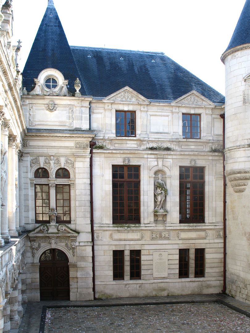 La Rochelle, Hôtel de Ville, France